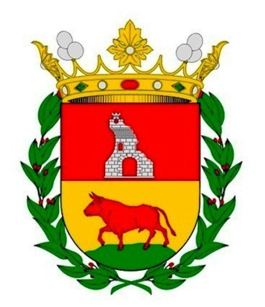 Blasón del Marquesado de Navarrés . Título nobiliario español que le fue otorgado a don Pedro Luis Garcerán de Borja, I marqués de Navarrés, en 1557 por el rey Felipe II de España.